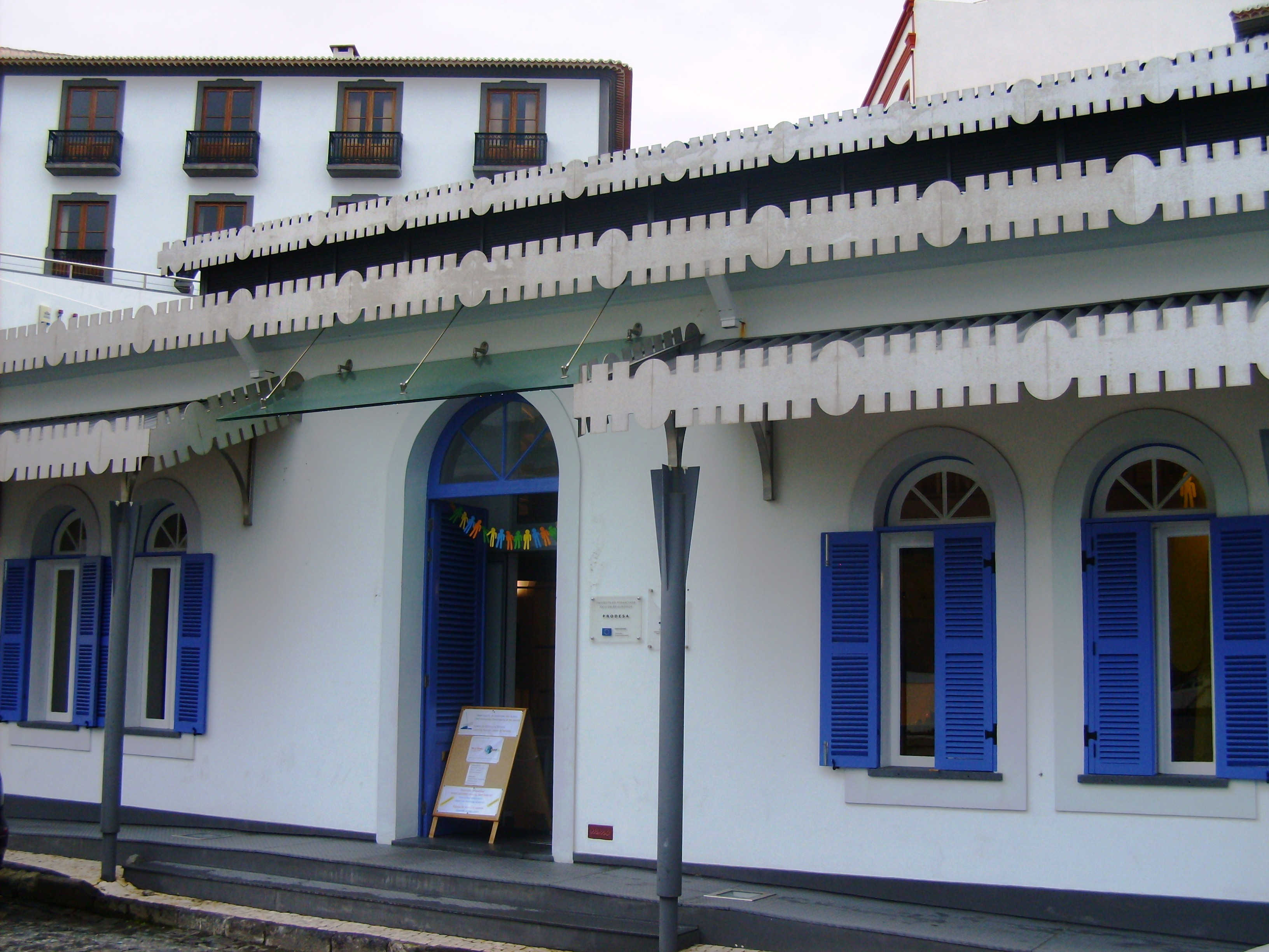 Observatório do Ambinte dos Açores, antiga "Casa do Peixe", centro histórico de Angra do Heroísmo, ilha Terceira, Açores.